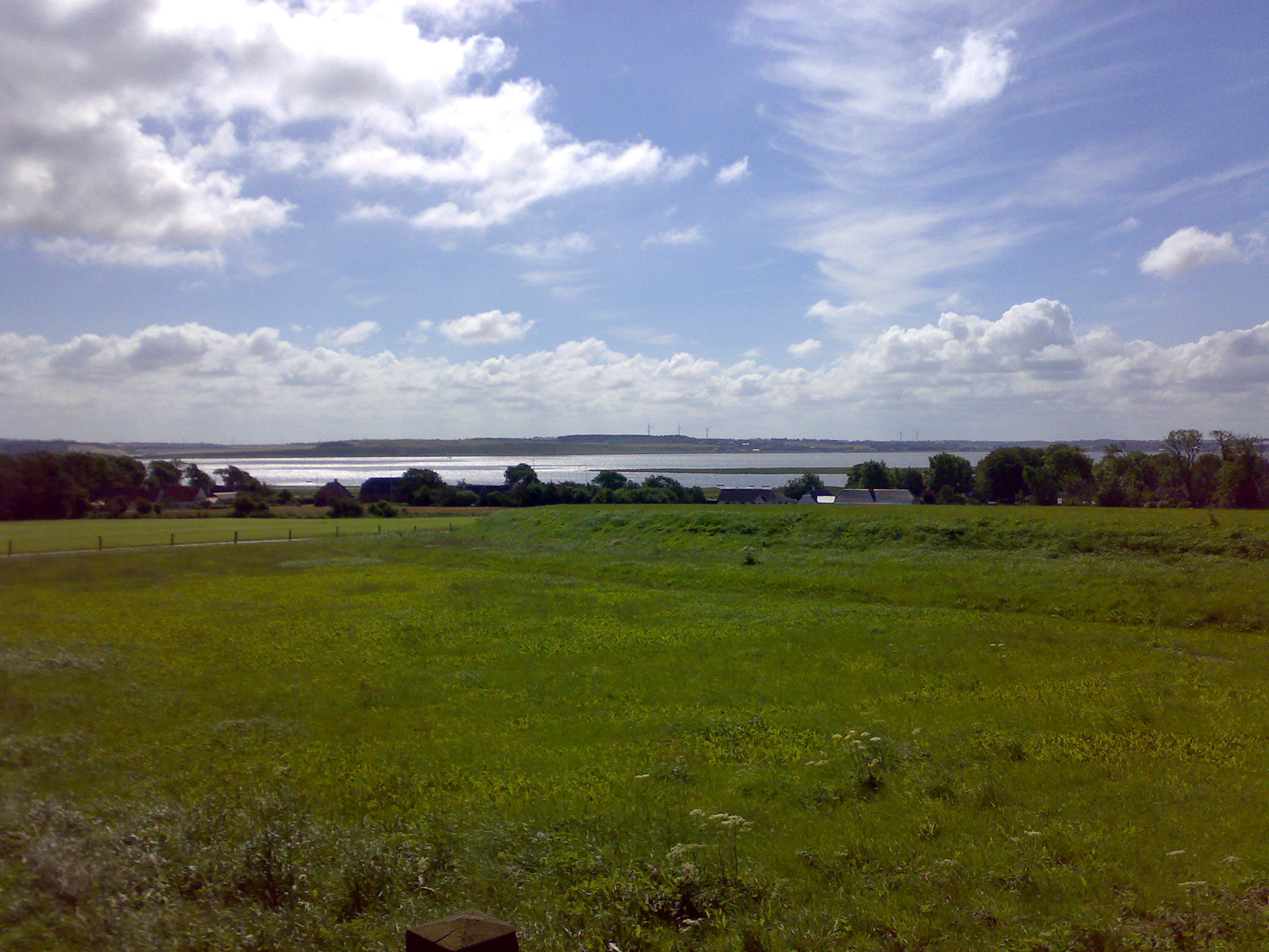 Aggersborg and Limfjorden, Denmark